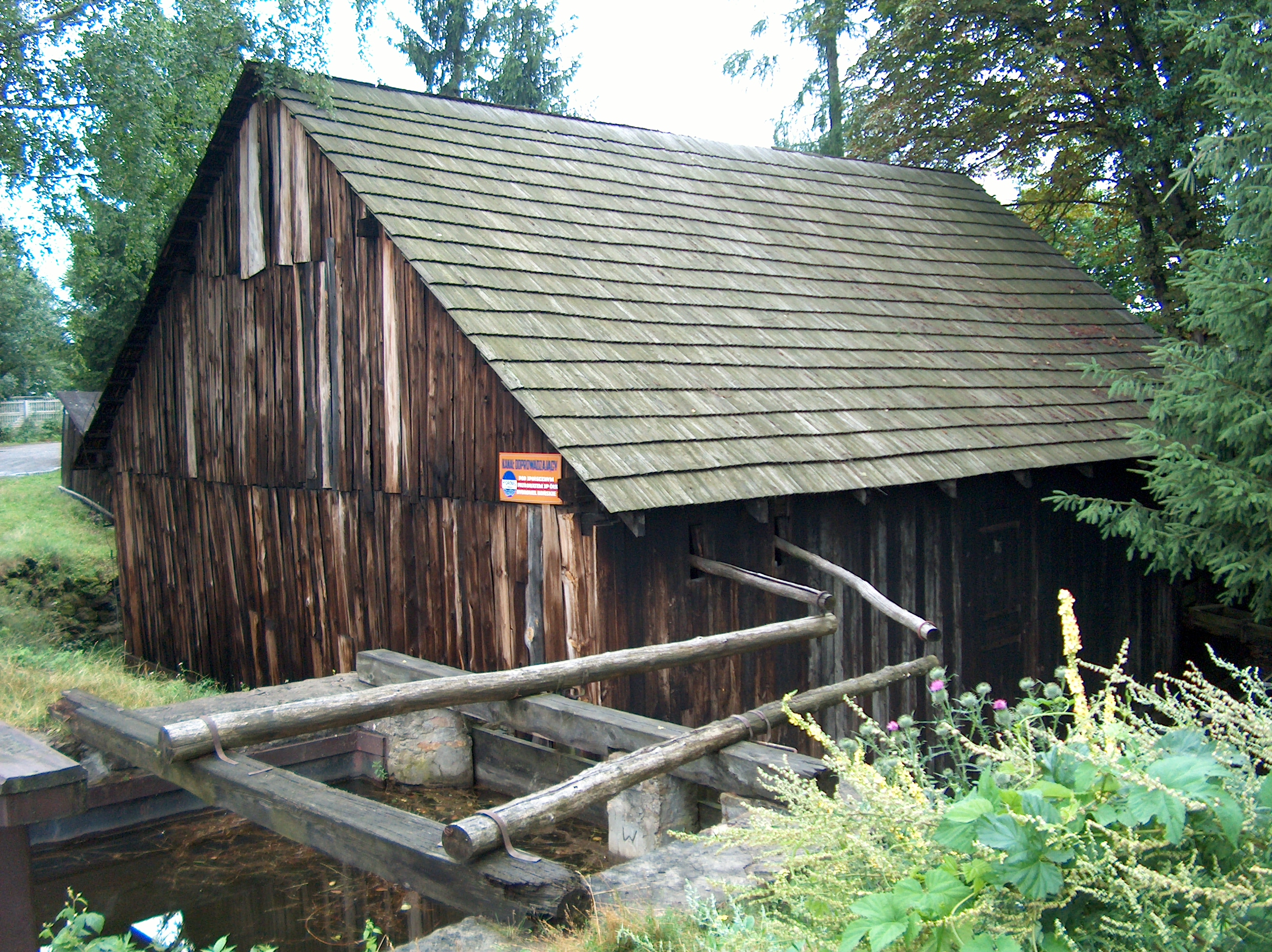 Zabytkowa kuźnia we wsi Stara Kuźnica k. Końskich. 492 from 18.10.1956 and 15.02.1972.